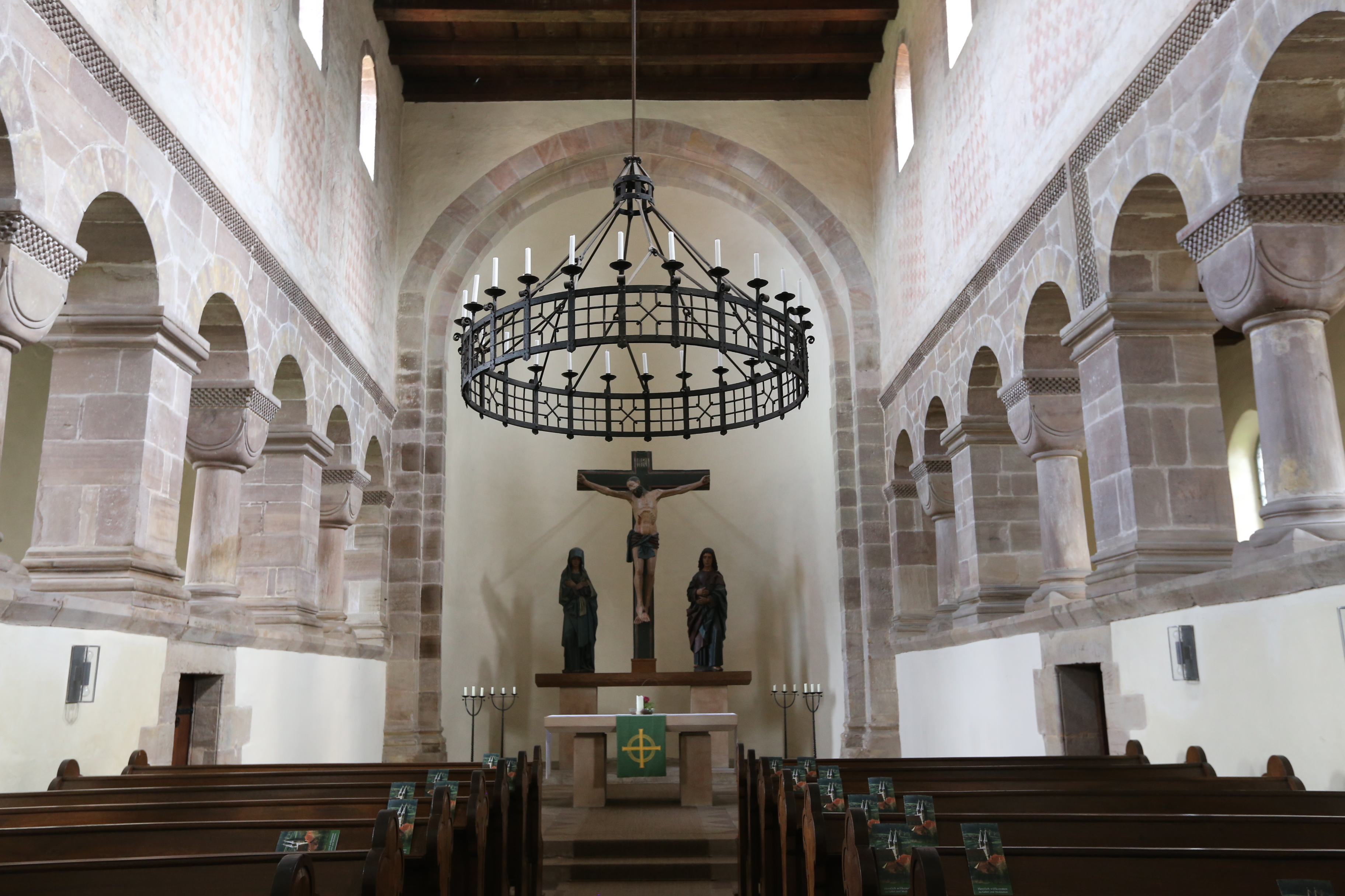 Kloster Bursfelde, (Hann. Gmünden), N. Saxen